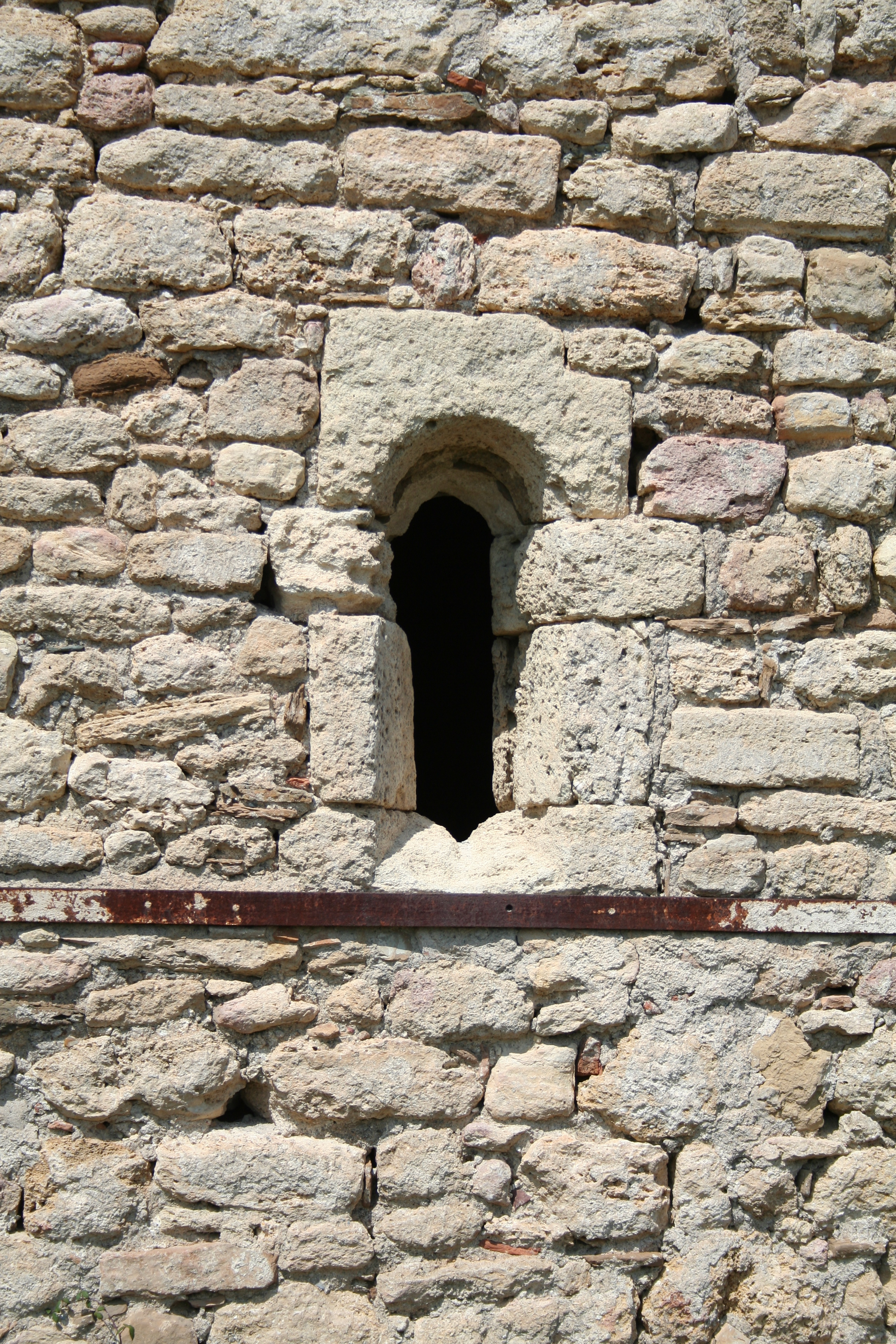 Roujan (Hérault) - église préromane Saint-Nazaire - détail d'une fenêtre.